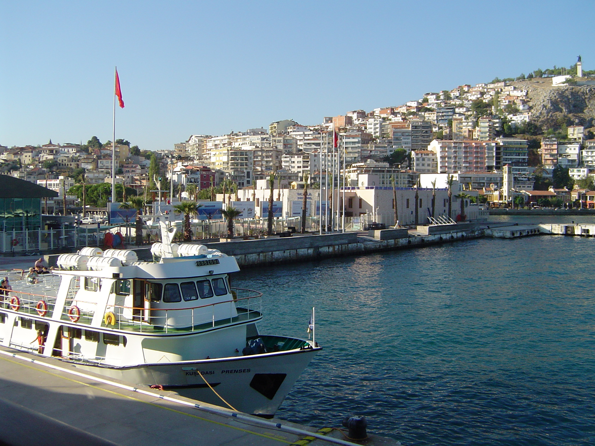 Kusadasi vum Mier aus gesinn (2005).